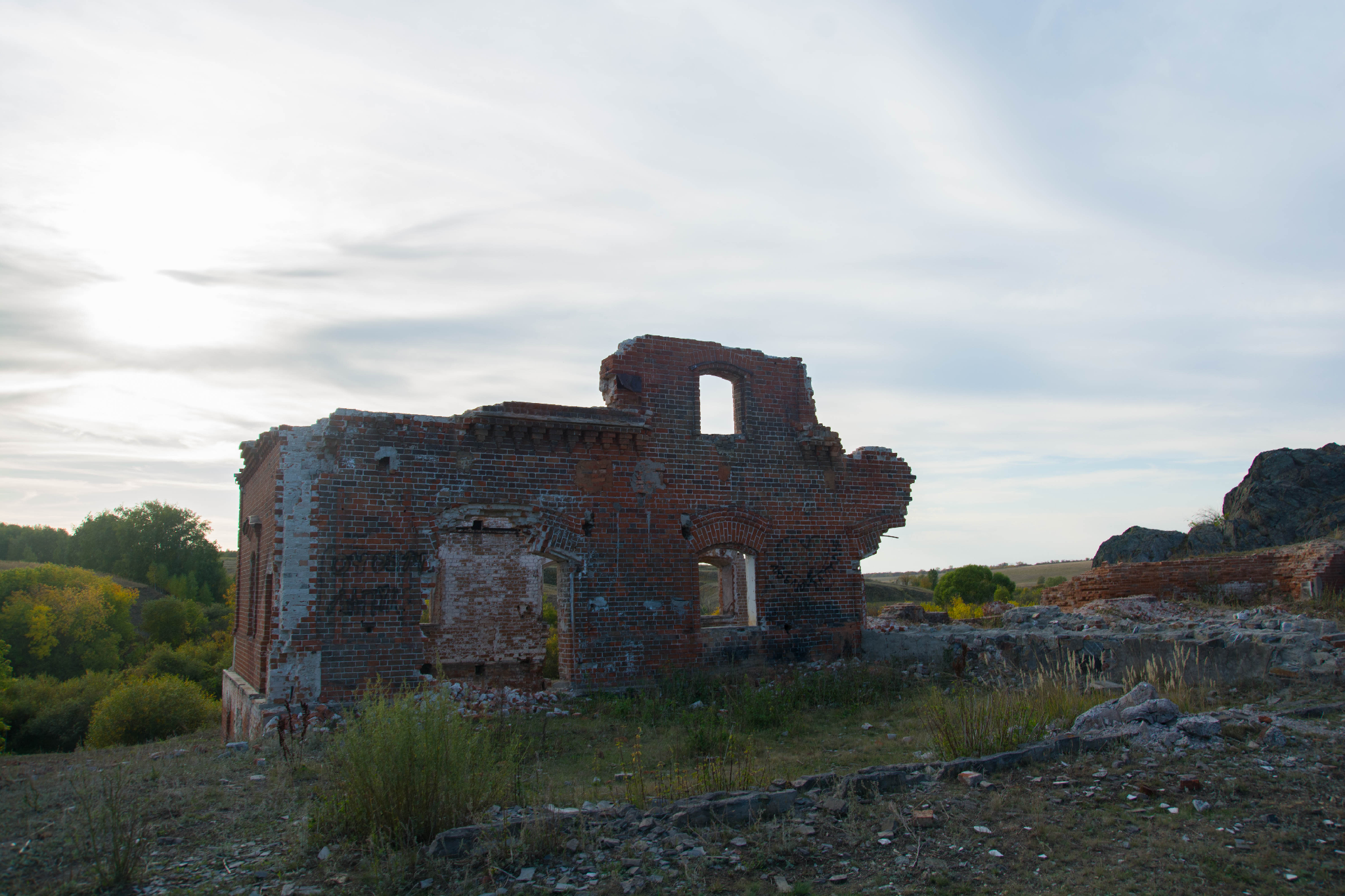 Разрушенная мельница Тумакова. Лето 2018 года.